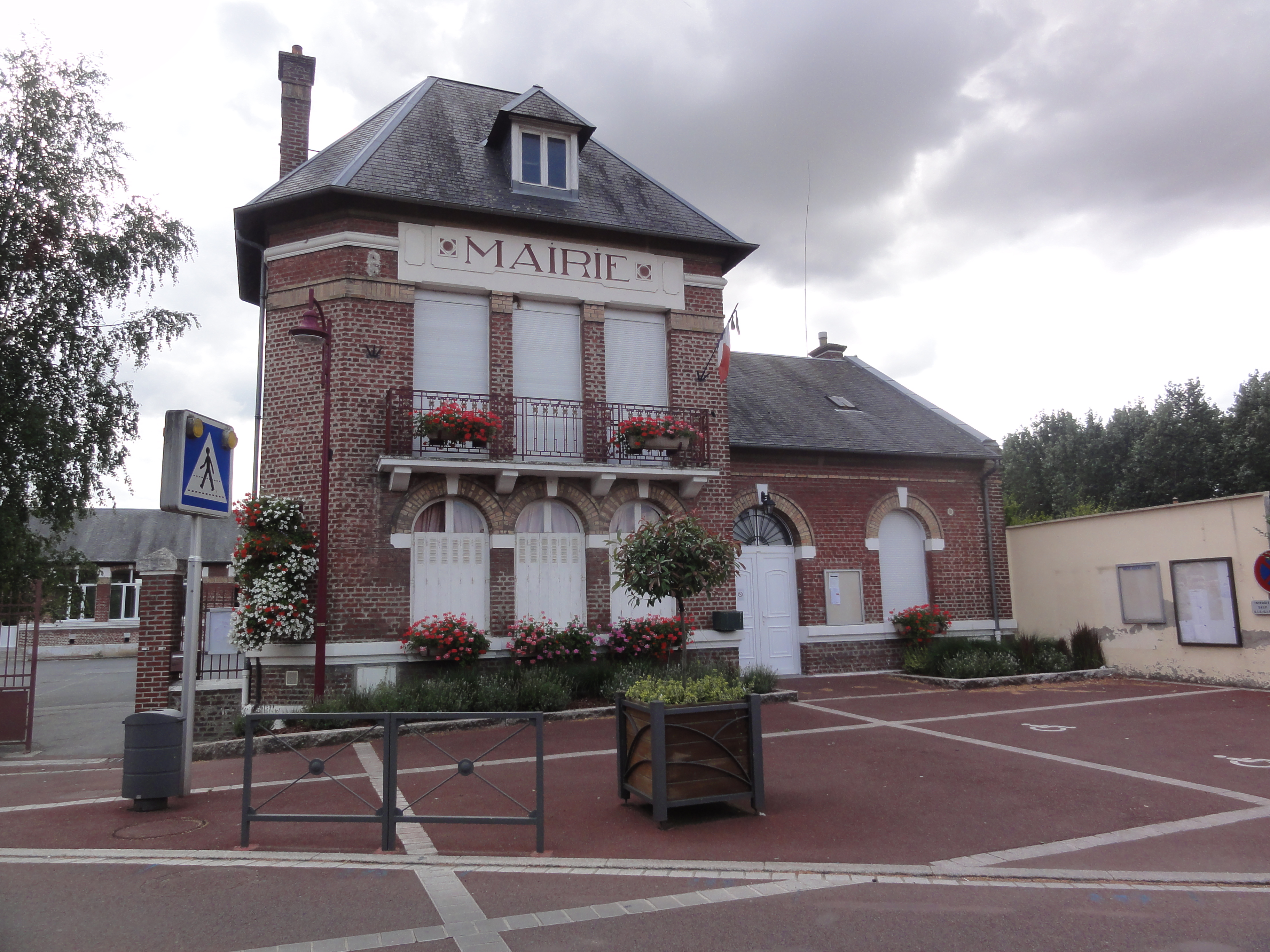 Grugies (Aisne) mairie